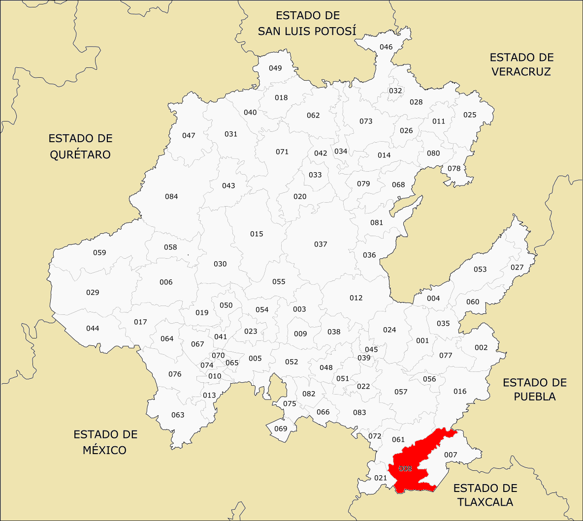 008 Municipios de Hidalgo